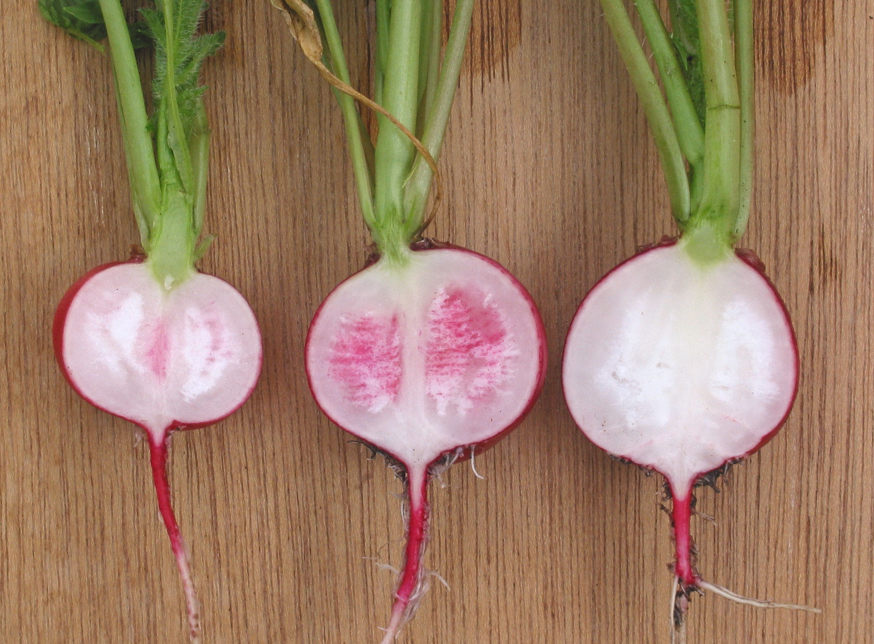 (Radijs voos) Raphanus sativus subsp. sativus spongy